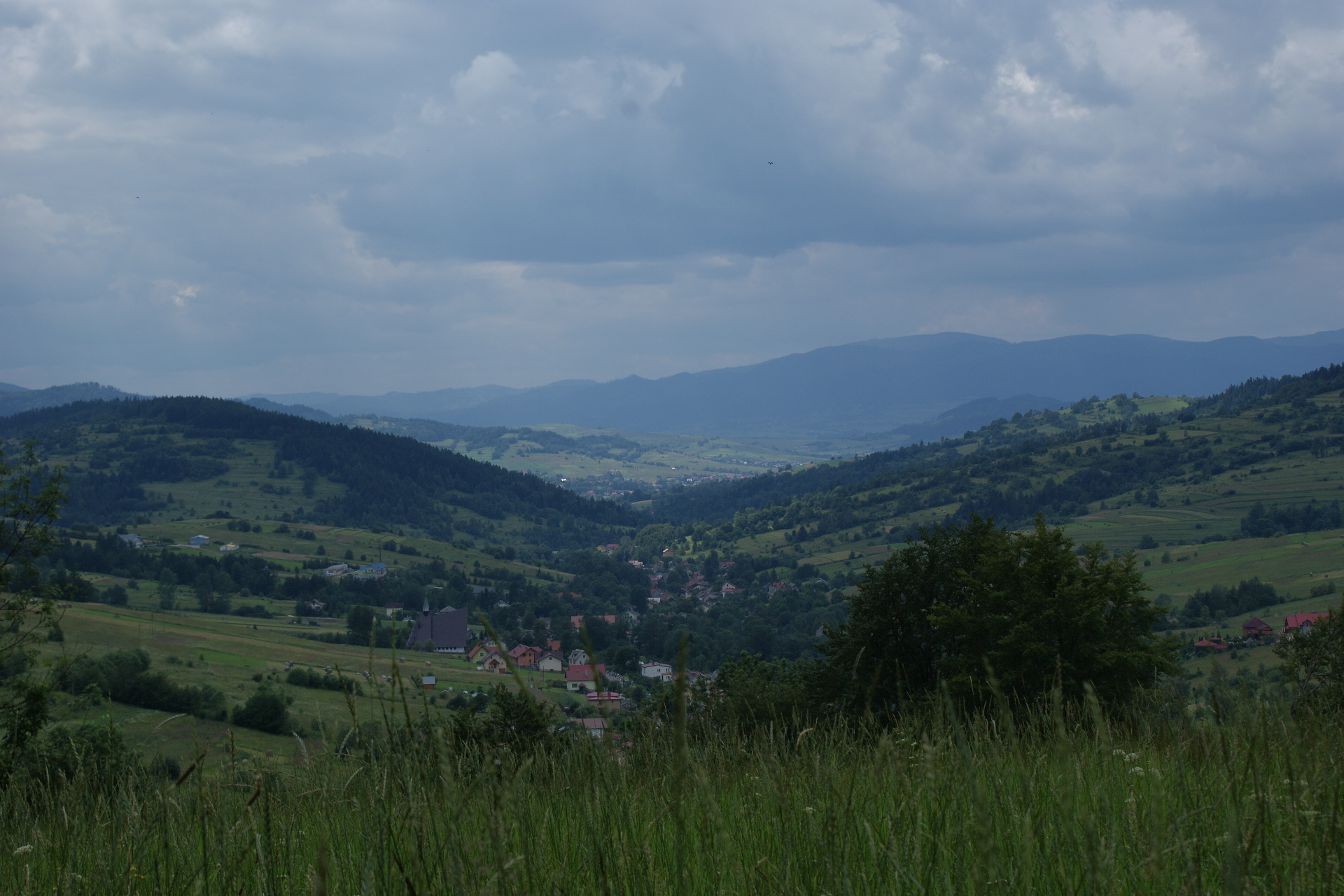 Pewel Ślemieńska widok od strony Gronia